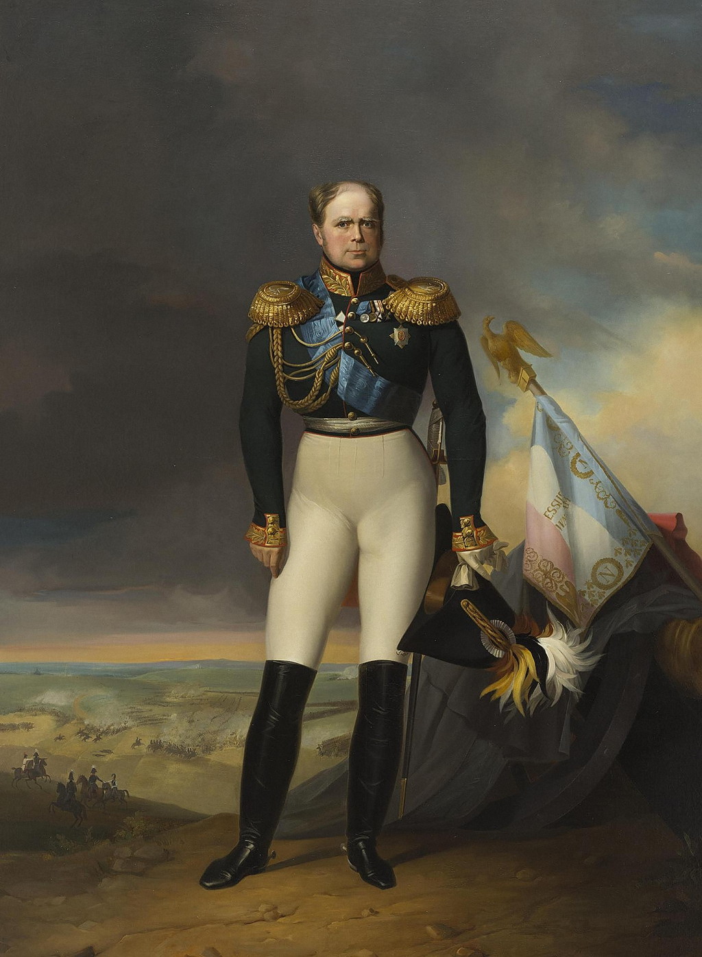 Картина «Портрет великого князя Константина Павловича» — художник Егор (Георг) Иванович Ботман, русский придворный живописец, портретист, академик Императорской Академии художеств.